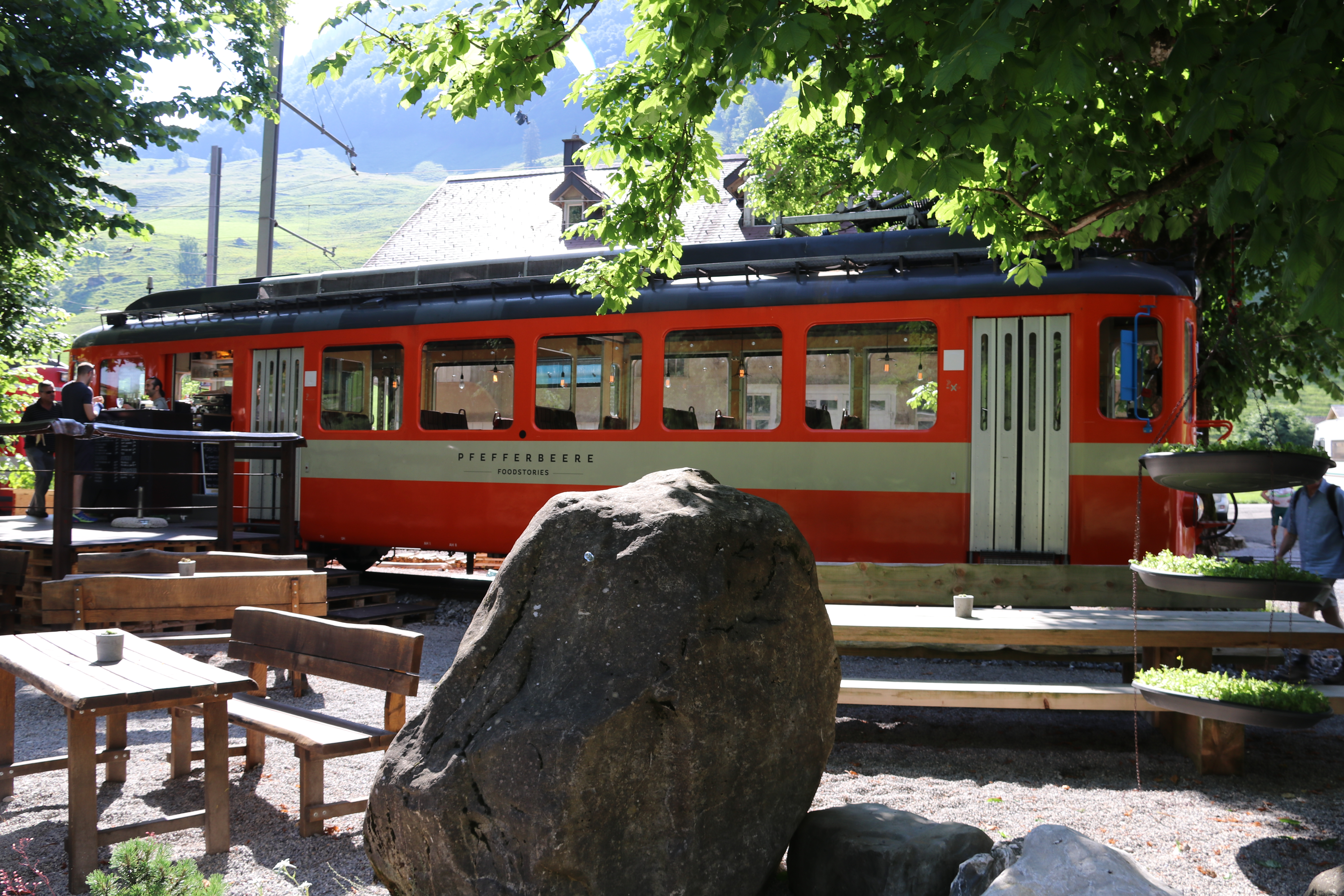 Triebwagen BDe 4/4 7 der früheren Trogenerbahn, aufgestellt an der Endstation Wasserauen der Appenzeller Bahnen als Restaurant "Loki"